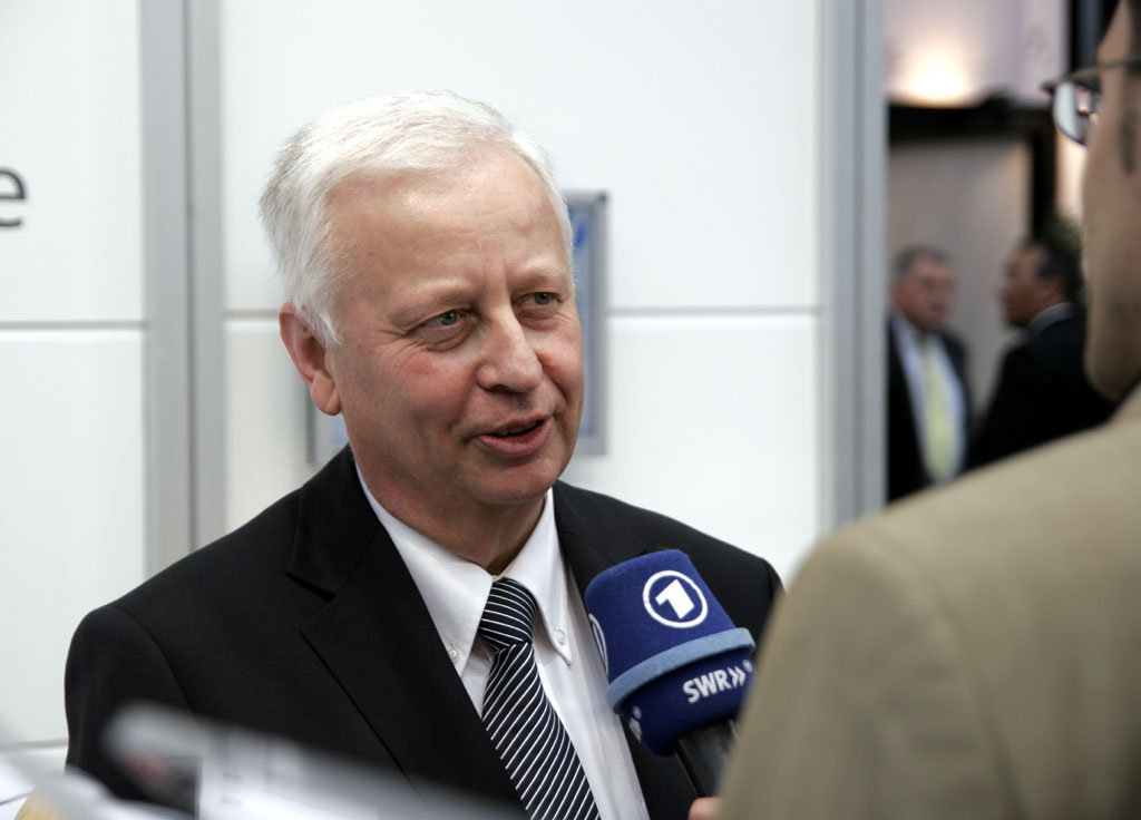 Der Vorsitzende von Innomag e.V. Karl-Heinz Lust im ARD-Interview auf der Hannover Messe 2007